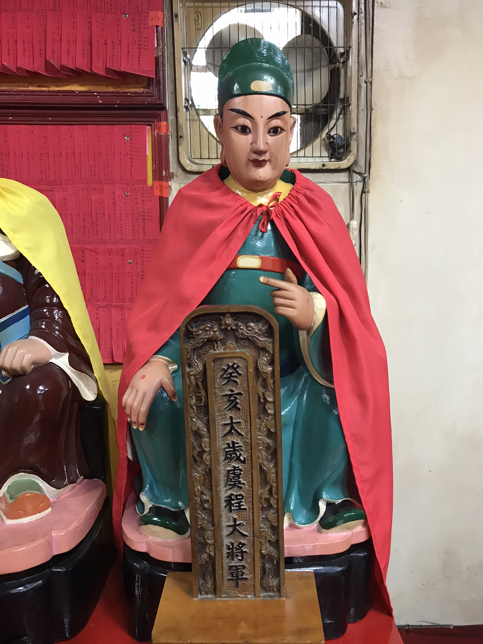 癸亥太歲虞程大將軍神像